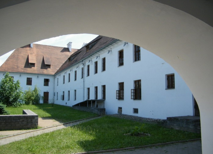 Беларуская (тарашкевіца): Комплекс будынкаў былога Сьвята-Духаўскага базылянскага манастыра: манастырскі корпус, манастырскі корпус, рэшткі Сьвята-Духаўскай царквы. г. Менск This is a photo of Belarusian heritage monument. Reference number: 712Г000238 ( WLM)